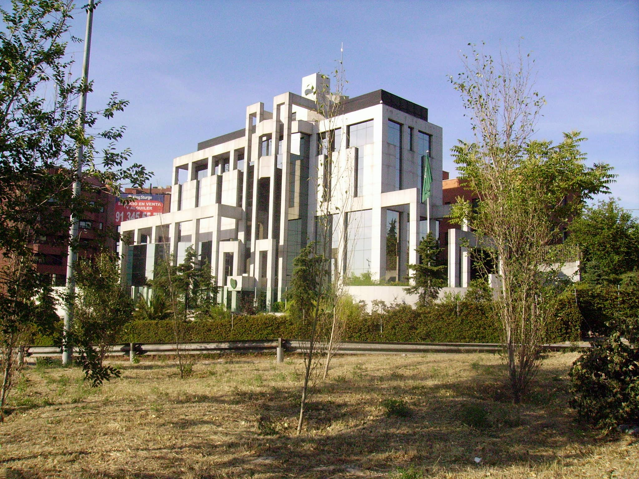 Embajada Del Reino De Arabia Saudi En España